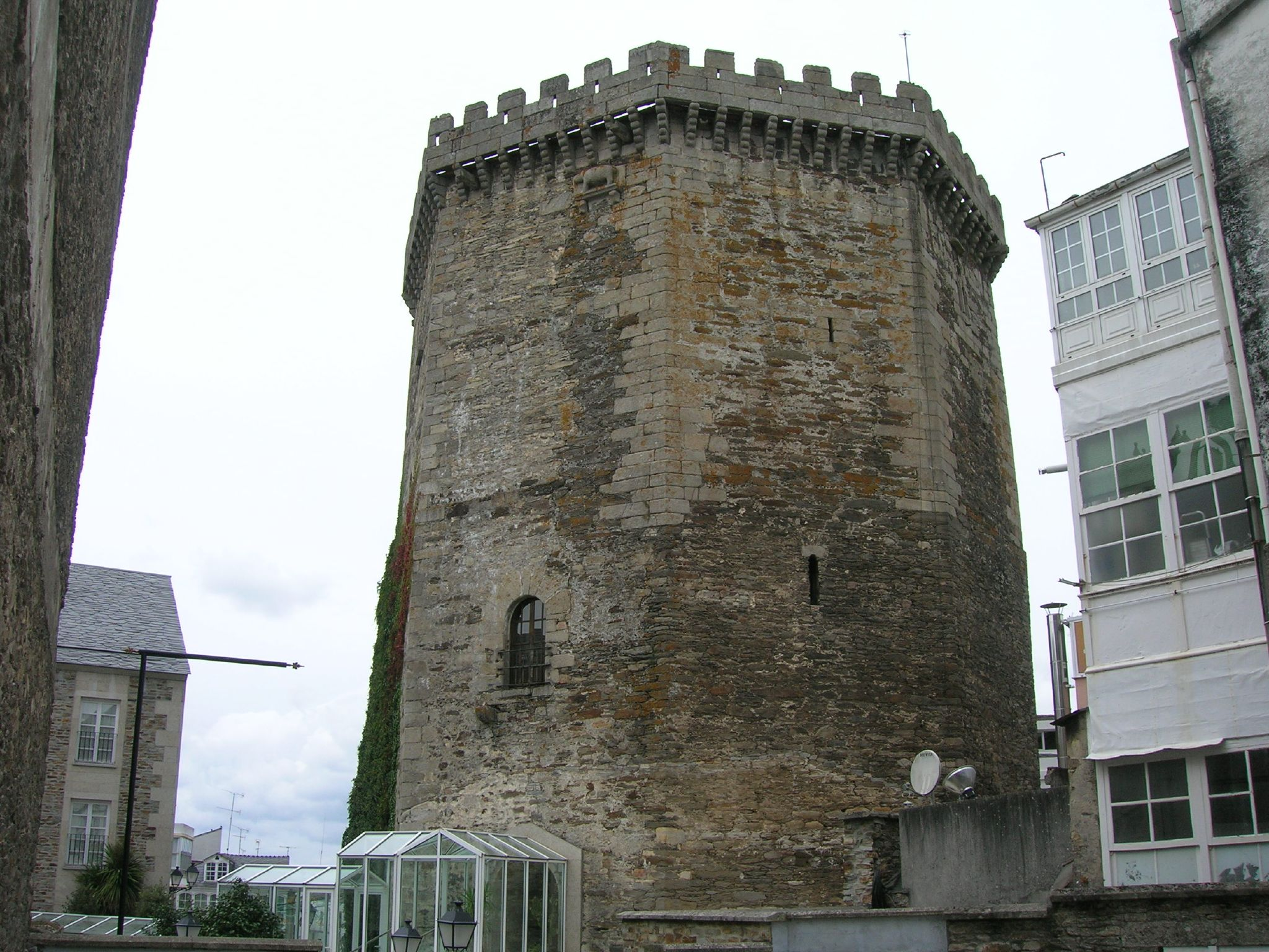 Torre de Vilalba